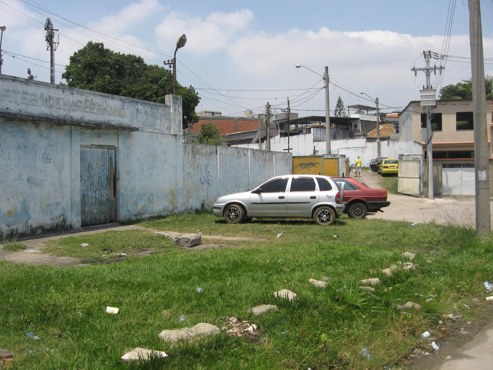 Sede do Everest Atlético Clube, localizado no bairro carioca de Inhaúma.